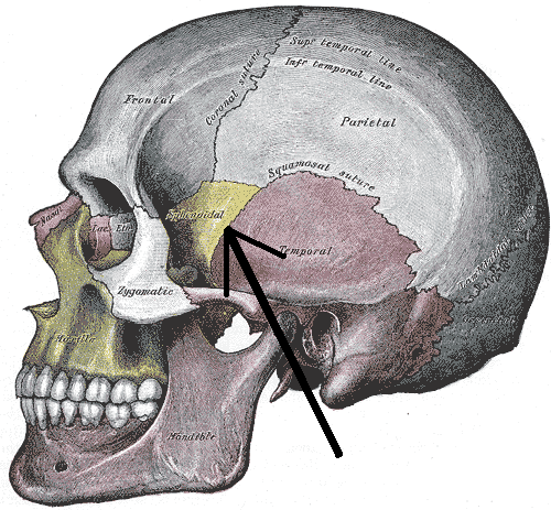 módosítva